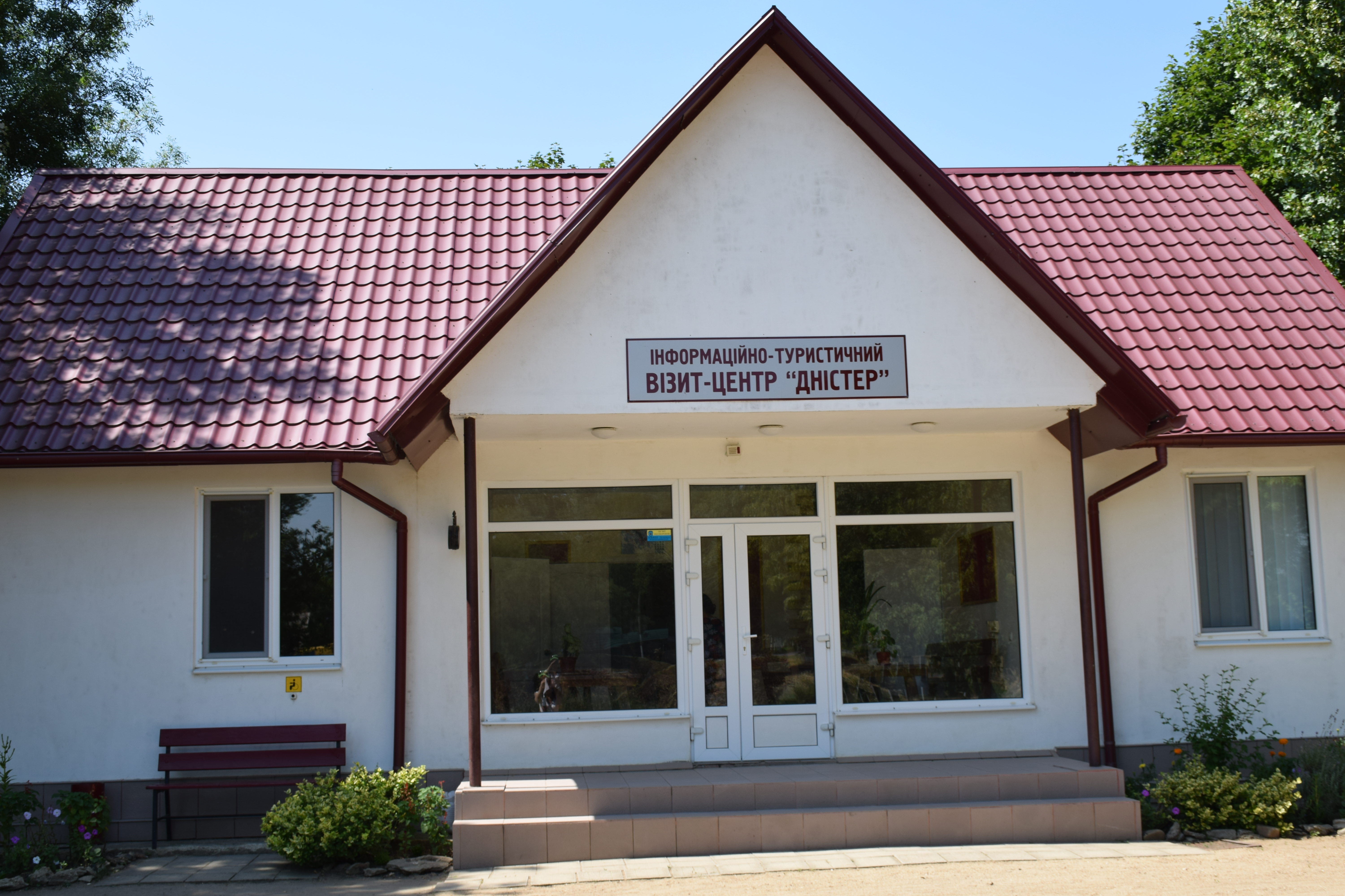 Парк «Дністер», м. Біляївка, водопровідна станція "Дністер"